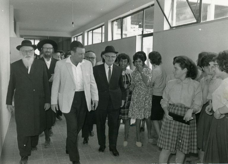 סמינר בית יעקב בירושלים. ביקור של משה פראגר, ראש העיר ירושלים טדי קולק והרב הלל ליברמן, מנהל הסמינר. מאחור עם המגבעת ר' אפרים מנצברג